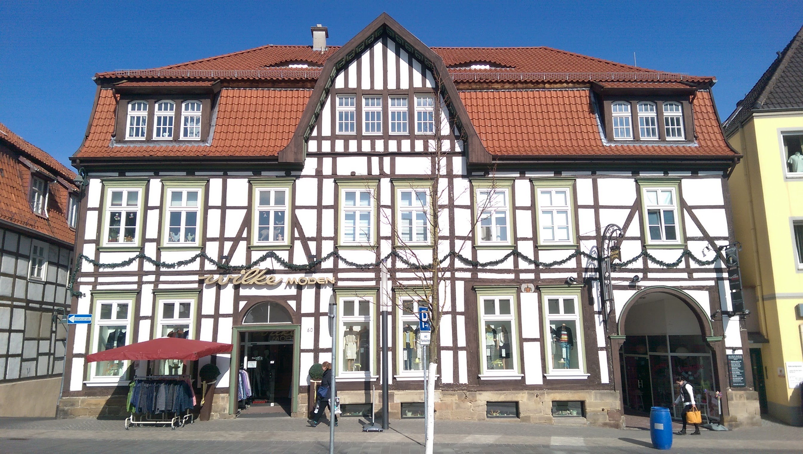 Warburg, Hauptstraße 60, ehem. Brauereiausschank Kohlschein